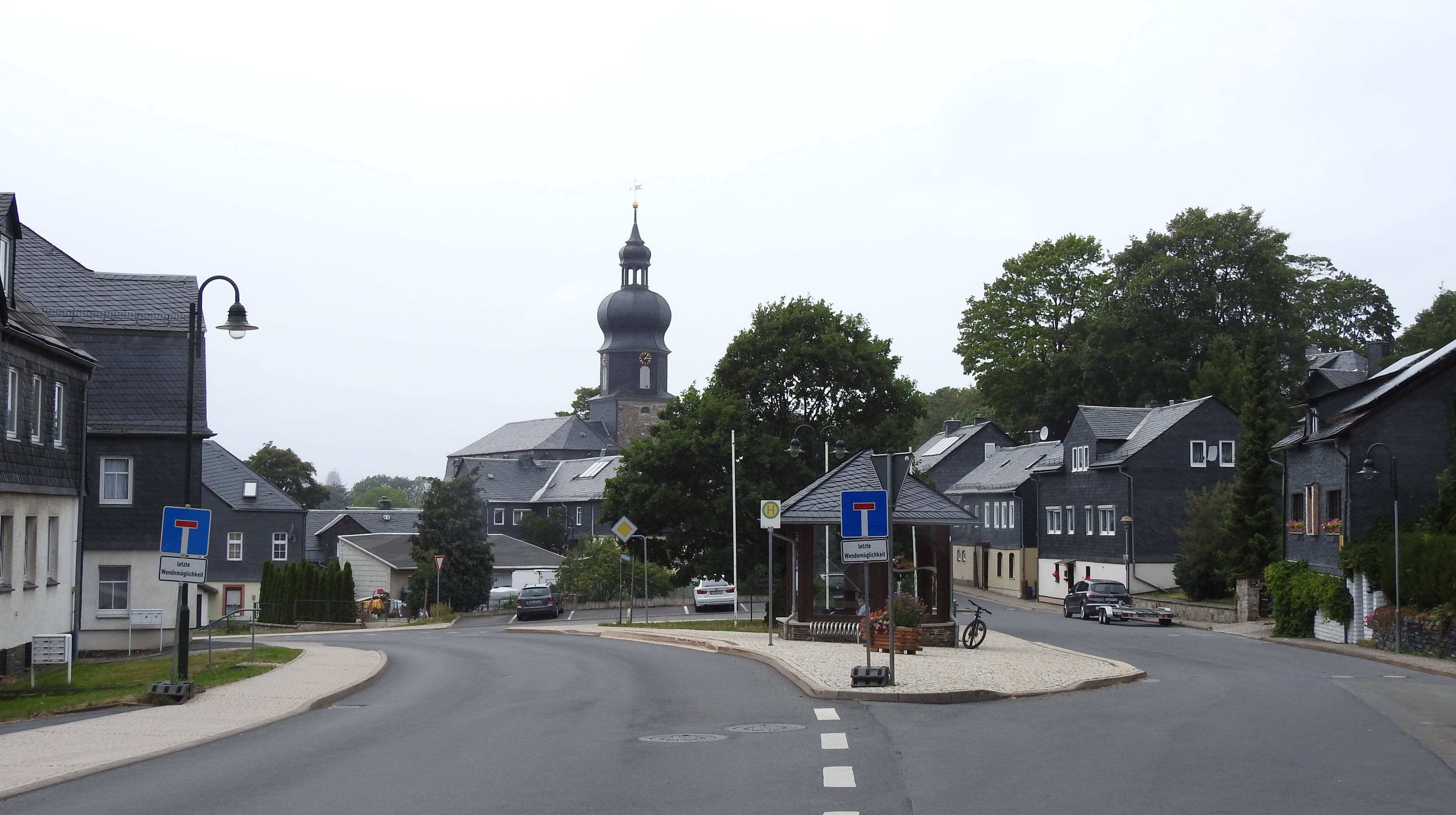 Obere Marktstraße in Lehesten